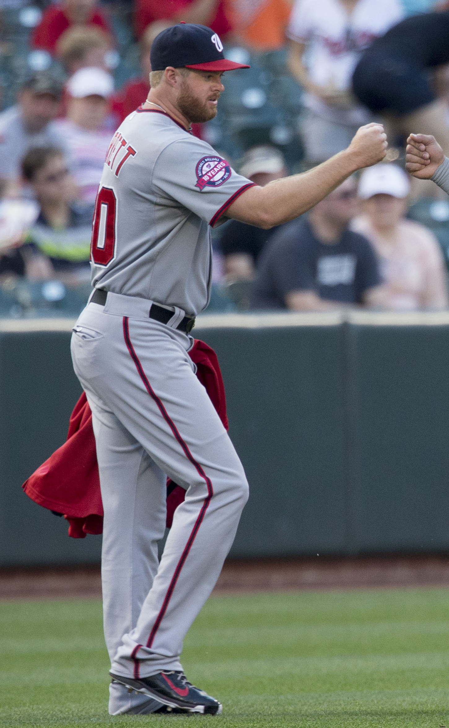 Aaron Barrett